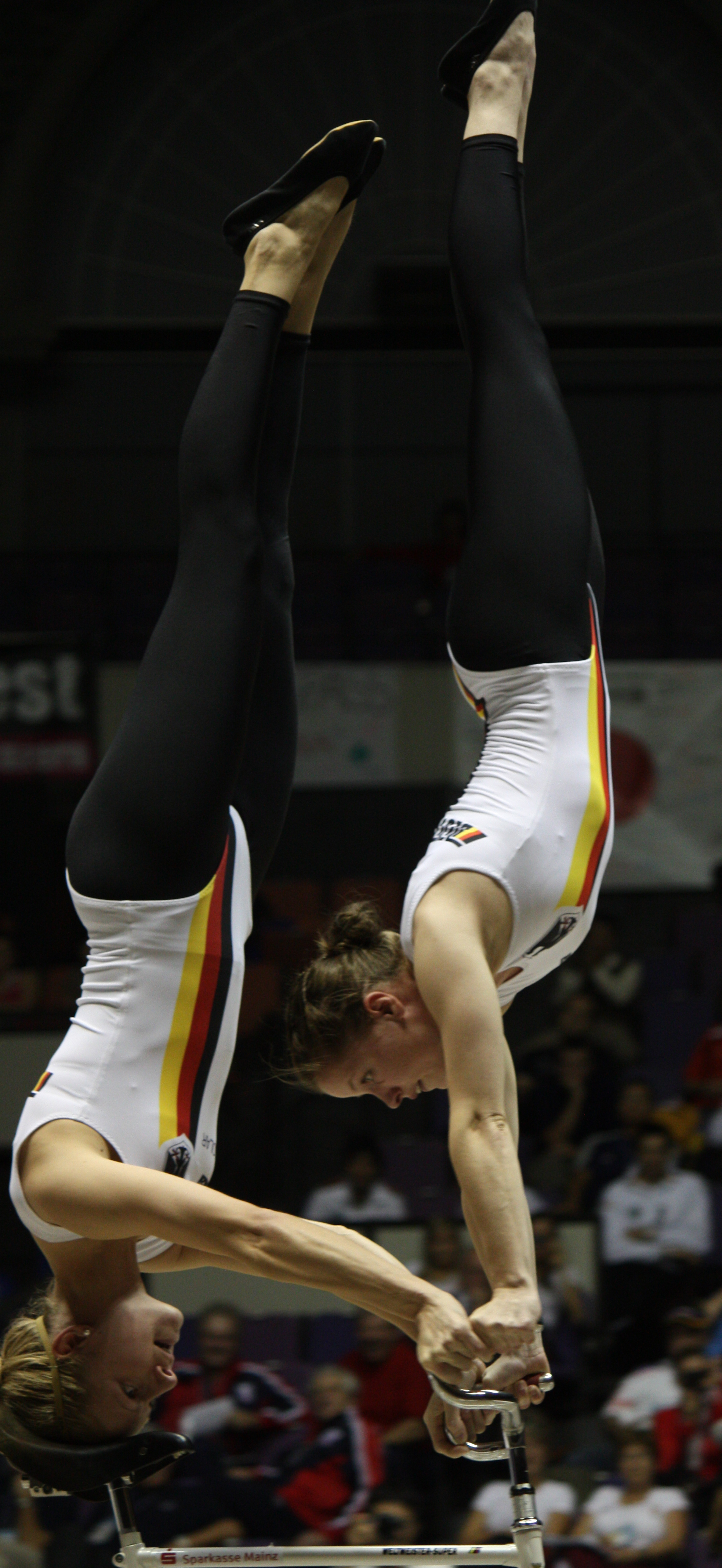 Katrin Schultheis und Sandra Sprinkmeier bei der WM 2011 in Kagoshima (Japan) - Sattelkopfstand/Lenkerhandstand